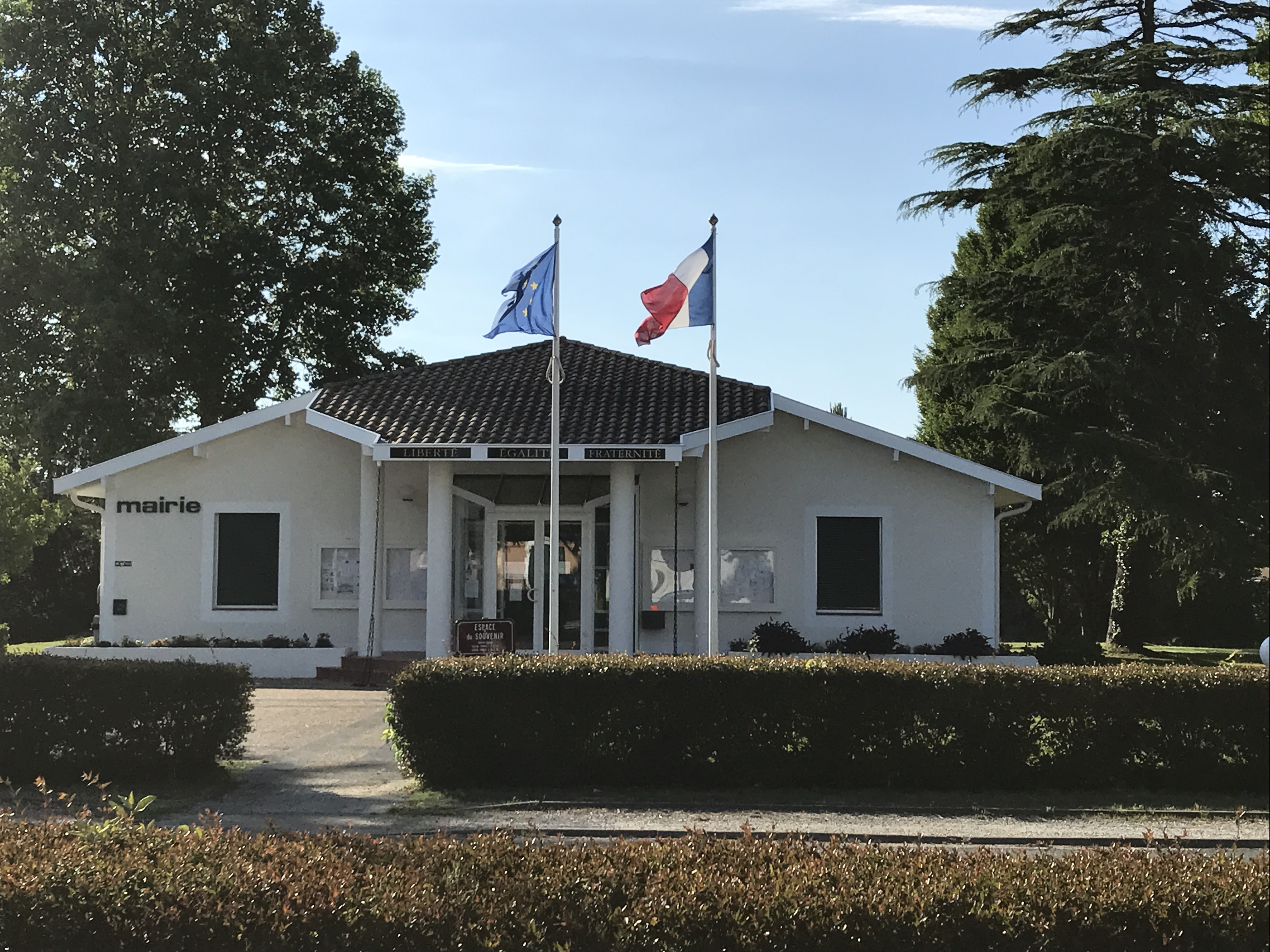 Mairie de Bias repeinte